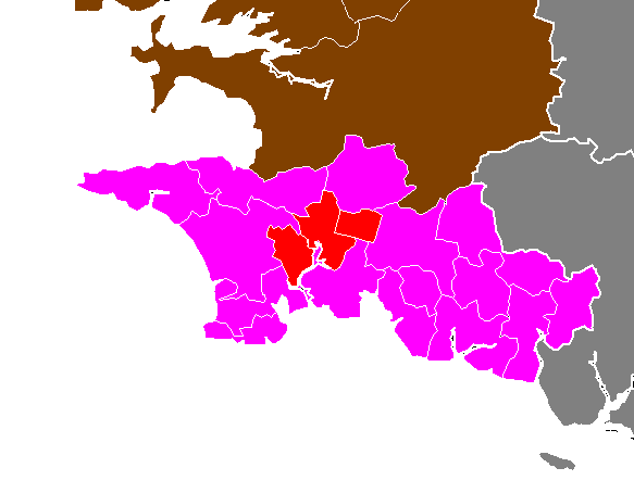 Maps of arrondissements and cantons of France: Arrondissement de Quimper - Cantons Quimper.PNG (Département du Finistère , Arrondissement de Quimper)